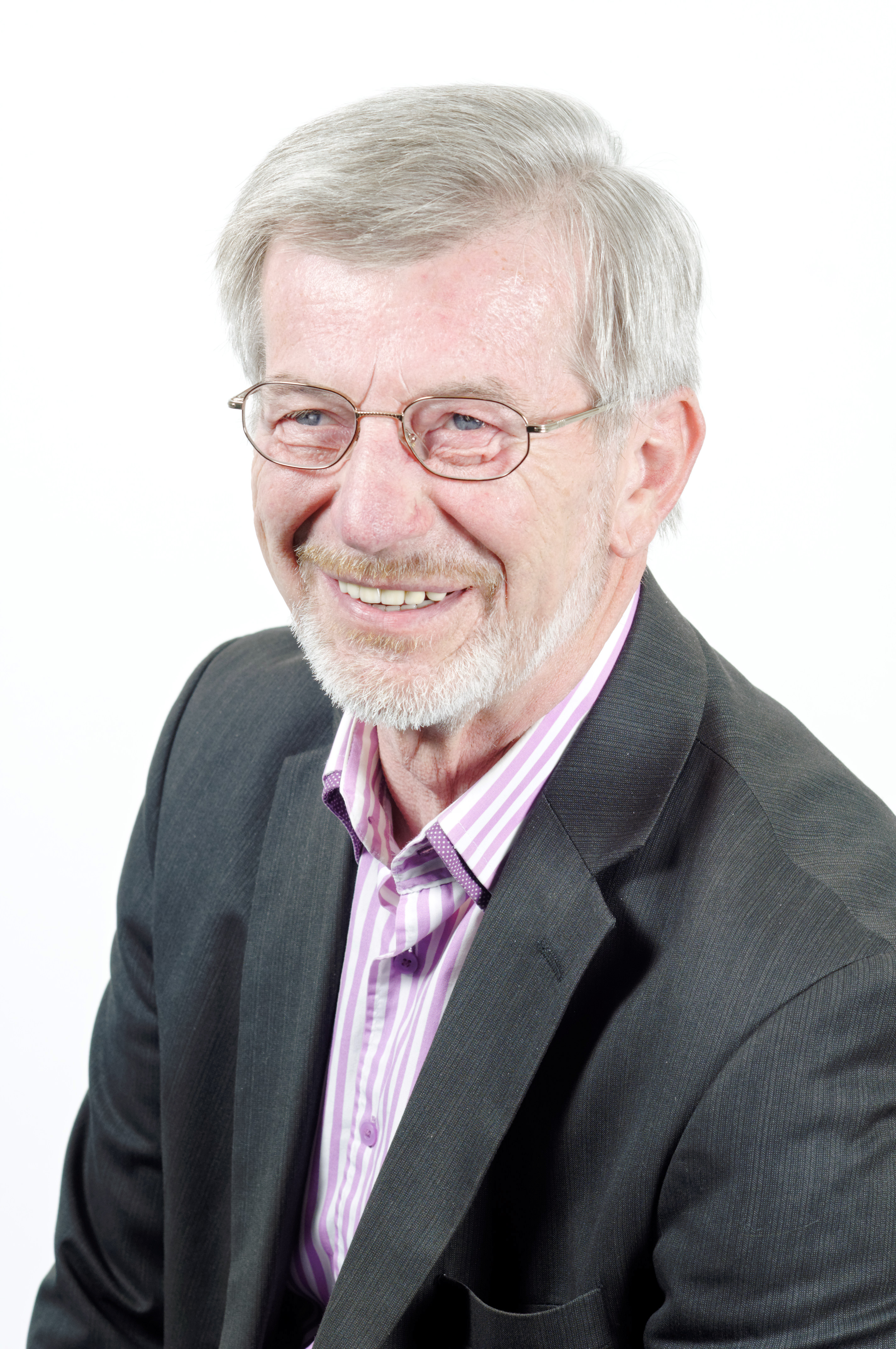 Siegfried Wetzel - Mitglied des Thüringer Landtages